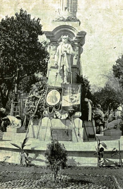 Fotografia tomadaen 1912